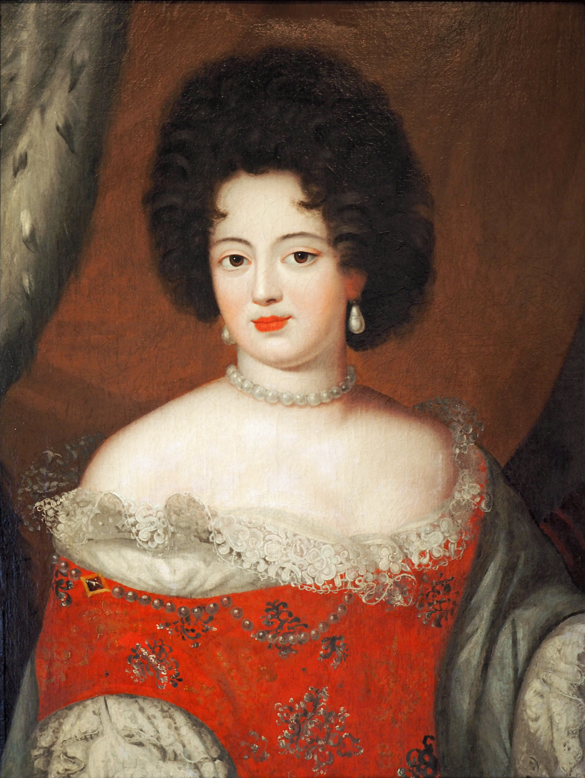 Sophie Dorothea, Prinzessin zu Braunschweig und Lüneburg (1666-1726)